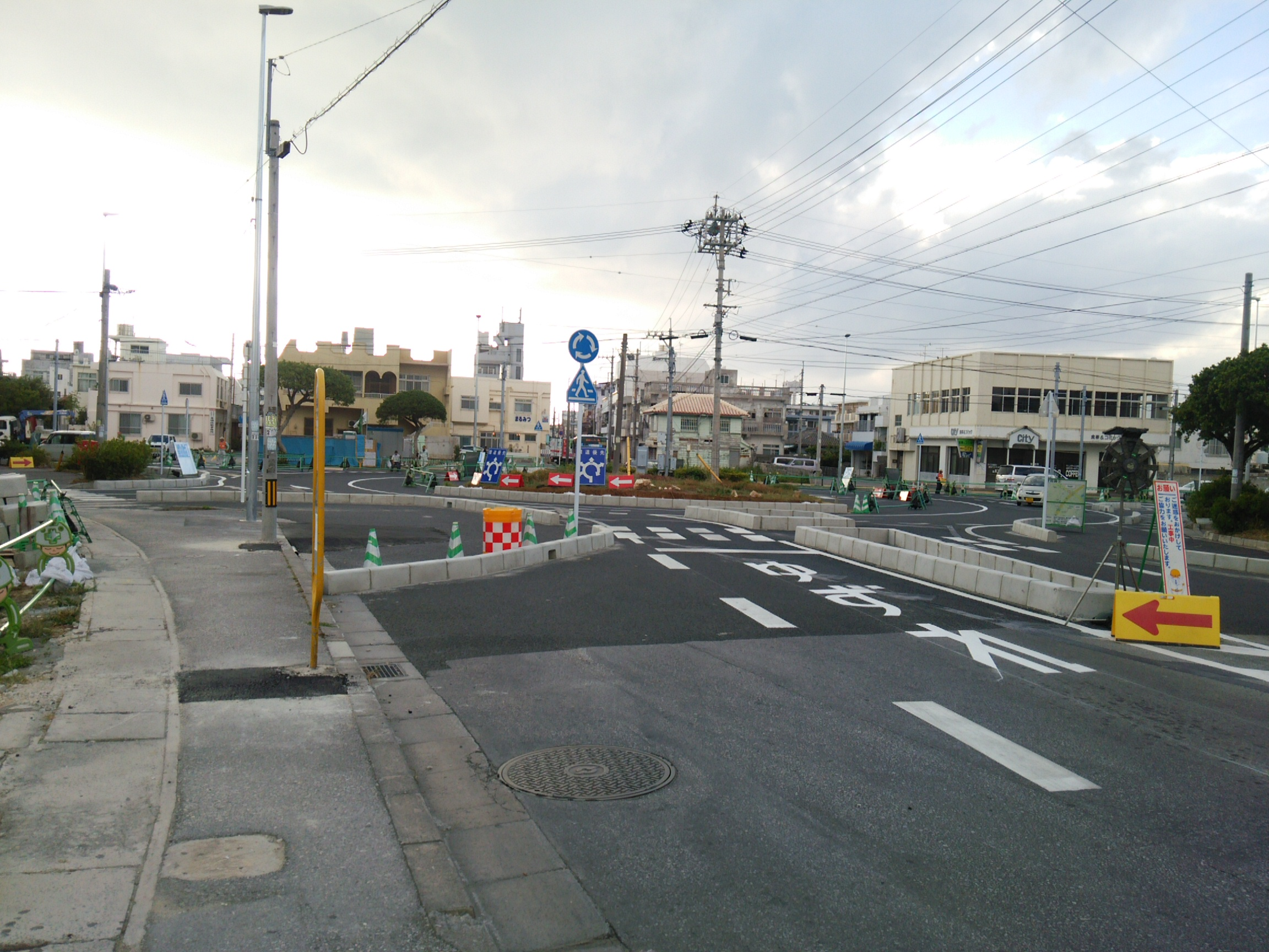 糸満ロータリーラウンドアバウト下から